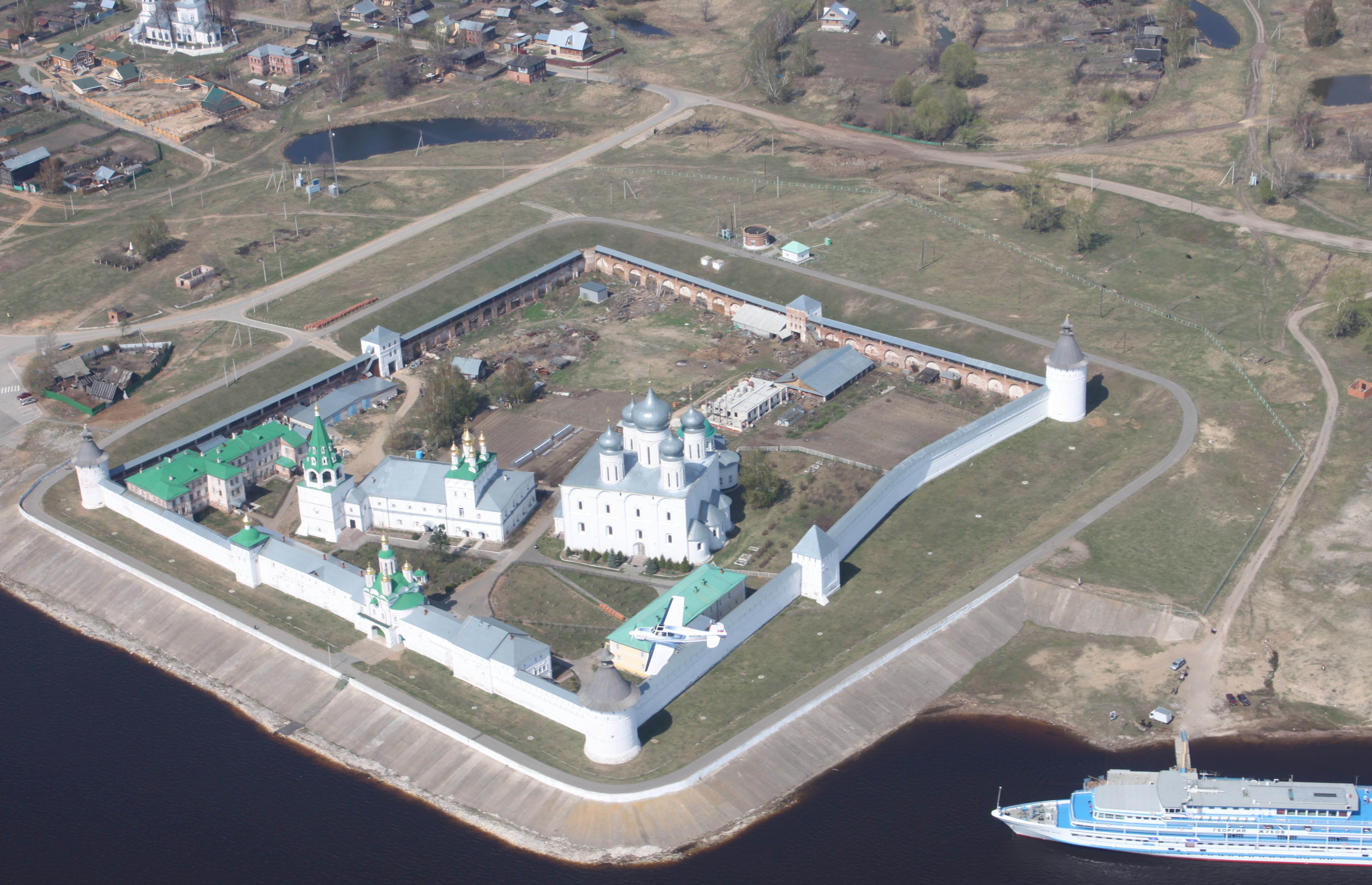 Вид на монастырь сверху